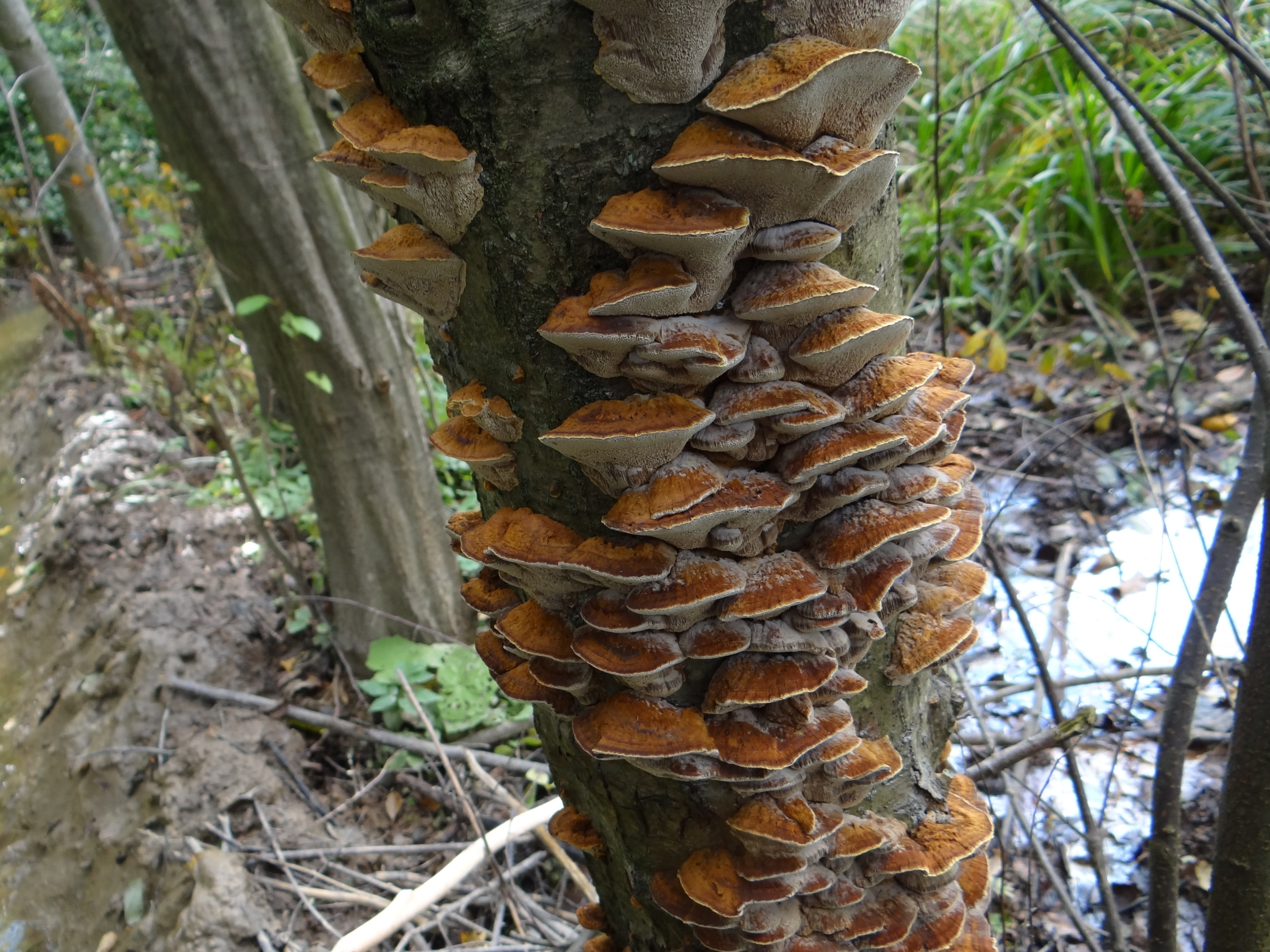 Xanthoporia radiata (location: Poland, Leszczyna, województwo małopolskie)